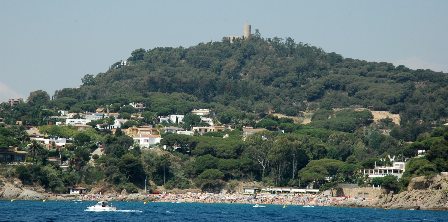 Cala Sant Francesc, Blanes, Girona